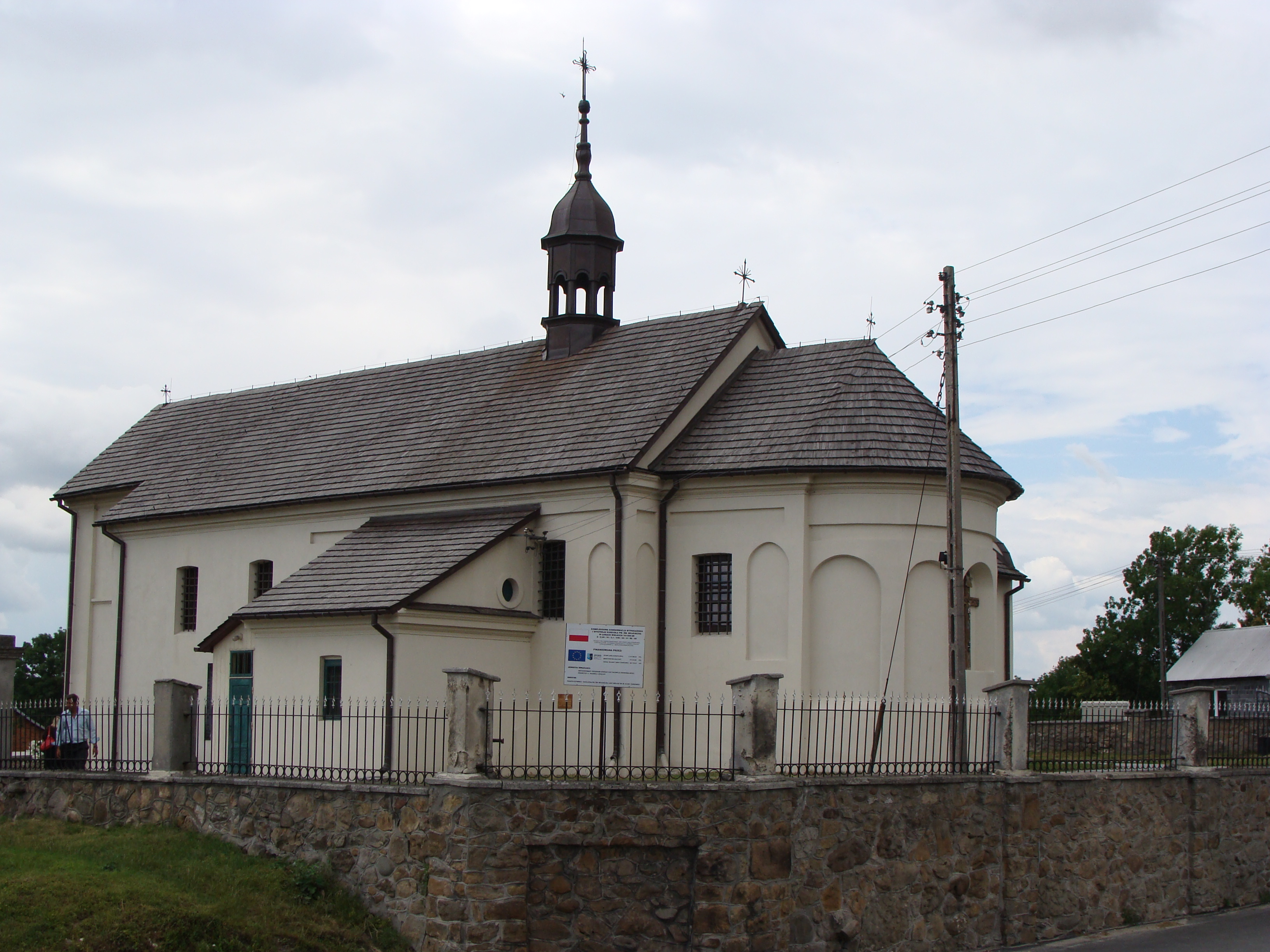 Łany Wielkie - kościół pw. św. Wojciecha z XIV w. (zabytek nr rejestr. A/1585/95)